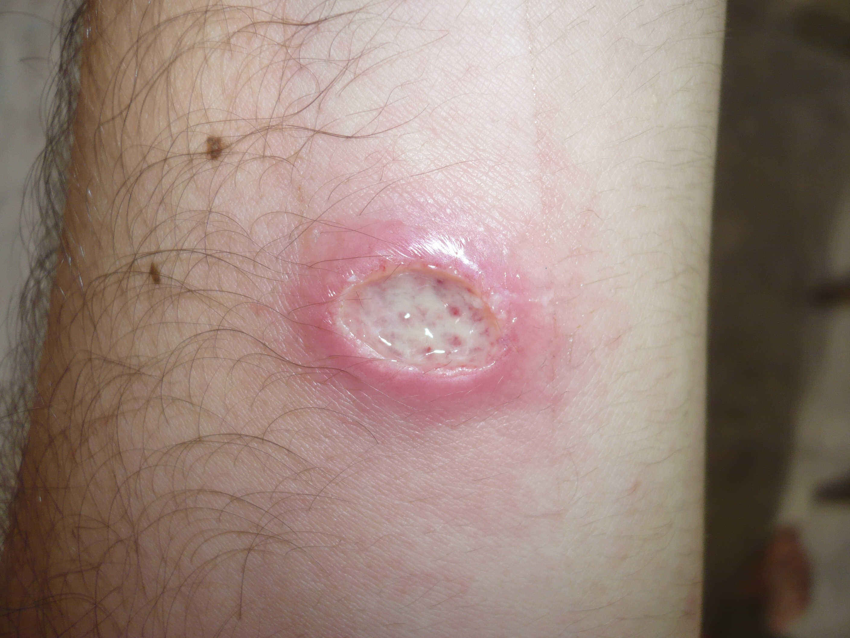 Herida causada por Leishmania braziliensis, contraida en Peru.